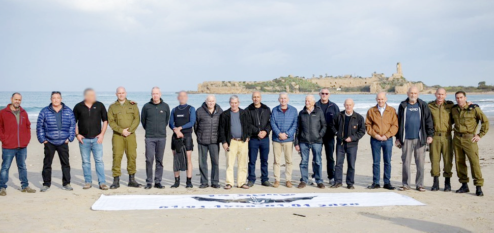 קבוצת מפקדי שייטת 13 בעבר בחגיגות יובל 70 להקמת היחידה ינואר 2020